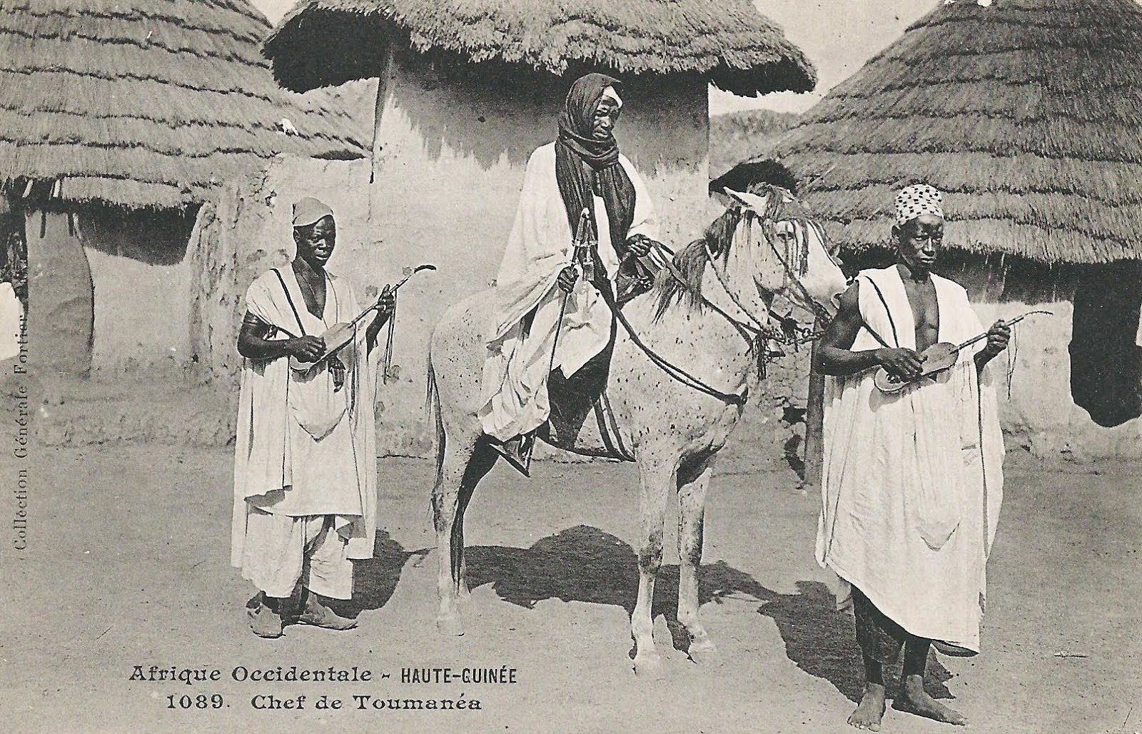 François-Edmond Fortier, Chef de Toumanéa. Afrique Occidentale. Haute-Guinée